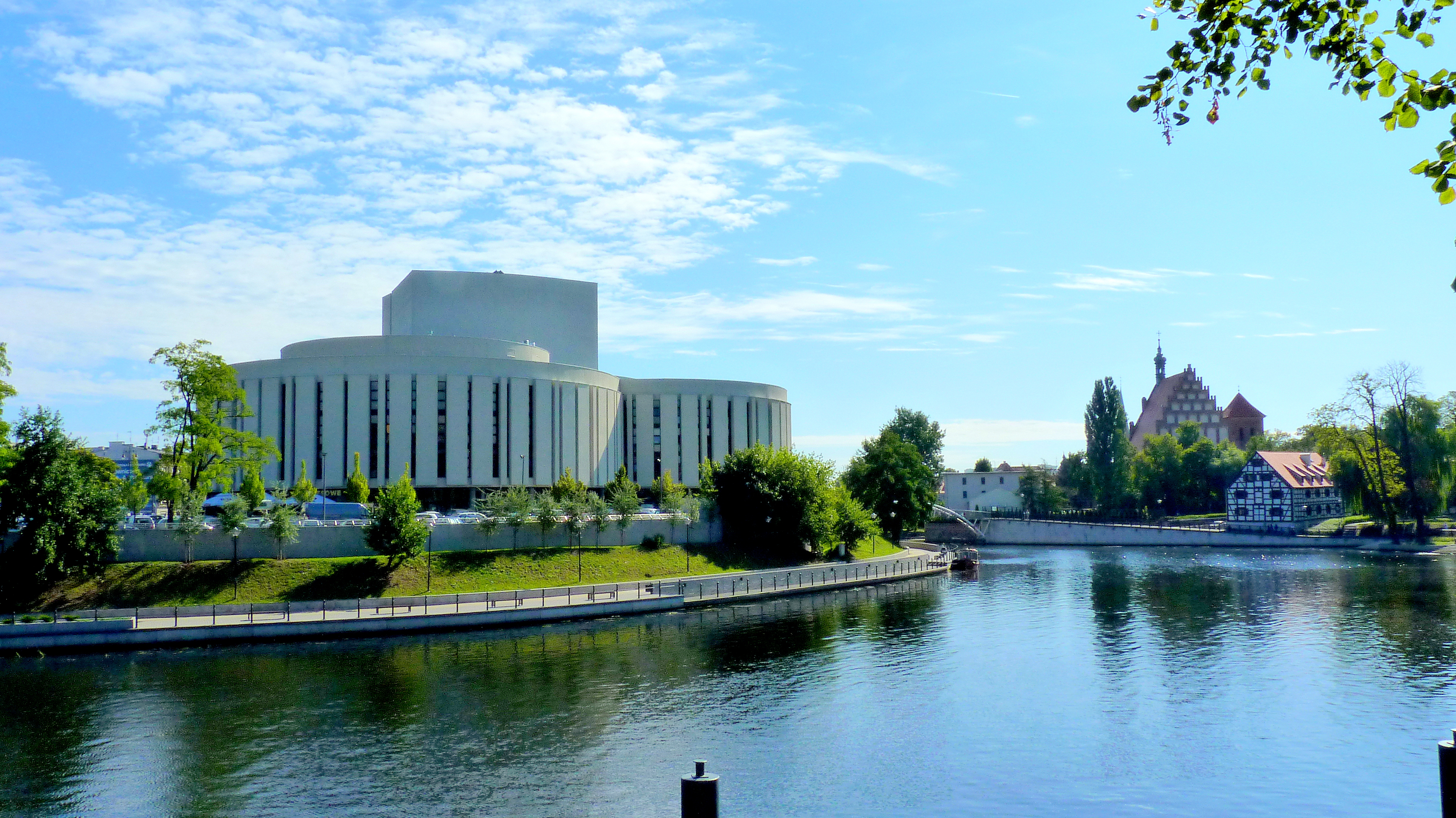 2012 .O8 .29 - Wyspa Młyńska , widok z wyspy